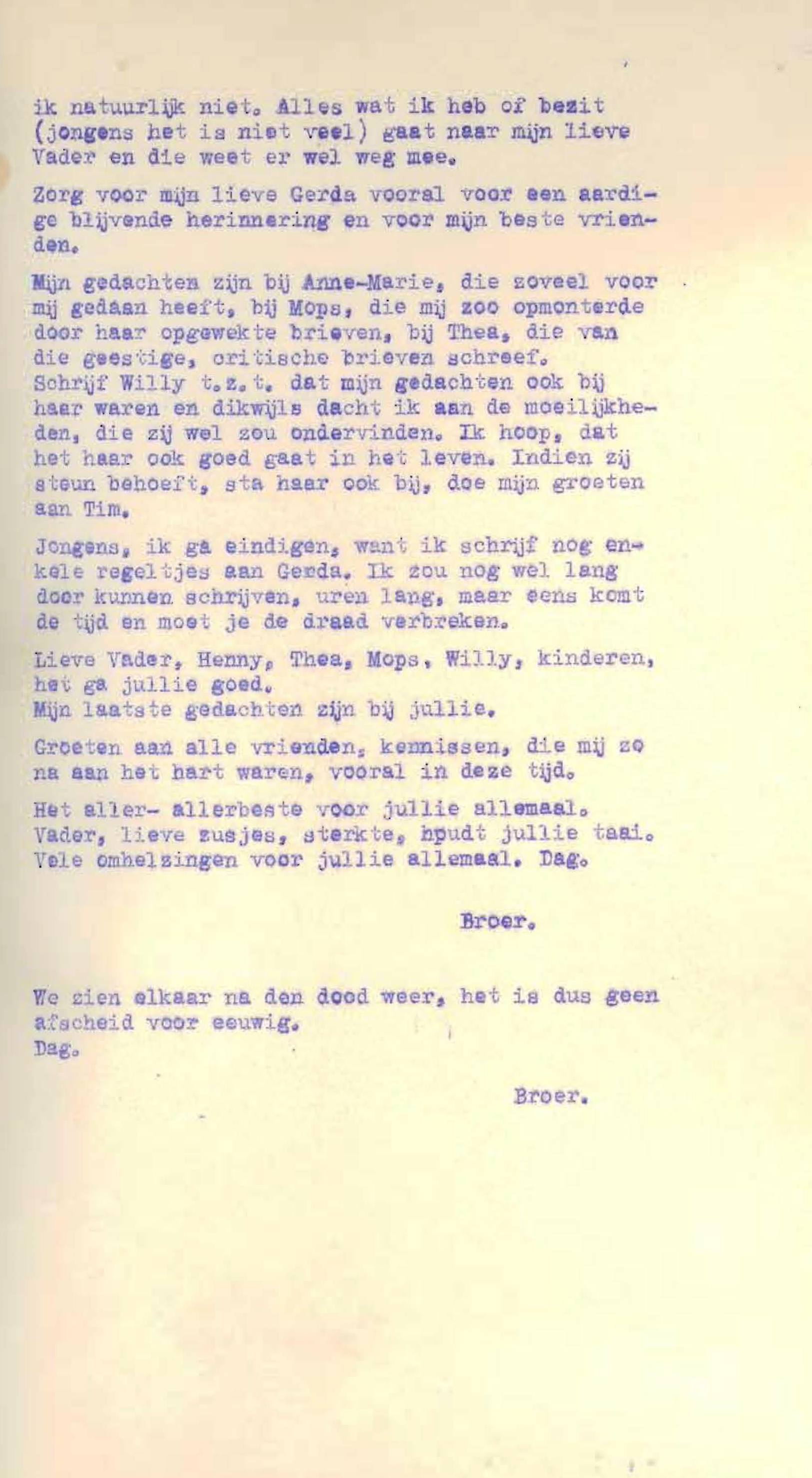 Pagina 3 van de afscheidsbrief Ardien Moonen - 7 aug 1943